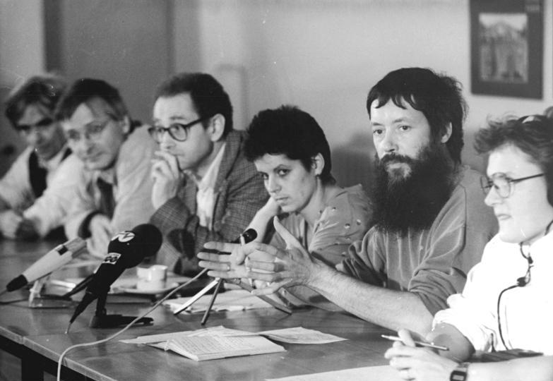 Berlin, Pressekonferenz der Grünen ADN Bernd Settnik 12 15.10.90 Berlin: Pressekonferenz. Auf einer Pressekonferenz zogen die Bürgerbewegungen und die Grünen Ost und West eine kritische Bilanz nach den Landtagswahlen. Die Ergebnisse hätten verdeutlicht, daß ein gemeinsames Antreten zu den Bundestagswahlen unumgänglich ist. Von rechts: Christina Schenk (UFV), Friedrich Heilmann (Grüne Ost), Kathrin Menge (Initiative Frieden und Menschenrechte), Konrad Weiß (Demokratie Jetzt), Klaus Wolfram (Neues Forum), Christian Ströbele (Grüne West). [Christina Schenk, Friedrich Heilmann, Kathrin Menge, Konrad Weiß, Klaus Wolfram, Christian Ströbele] Abgebildete Personen: Schenk, Christina: 1990 Unabhängiger Frauenverband, DDR Weiß, Konrad: 1990 Volkskammerabgeordneter, Demokratie jetzt, DDR